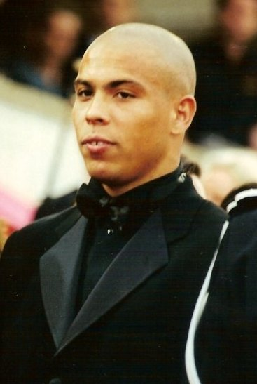 Ronaldo au festival de Cannes